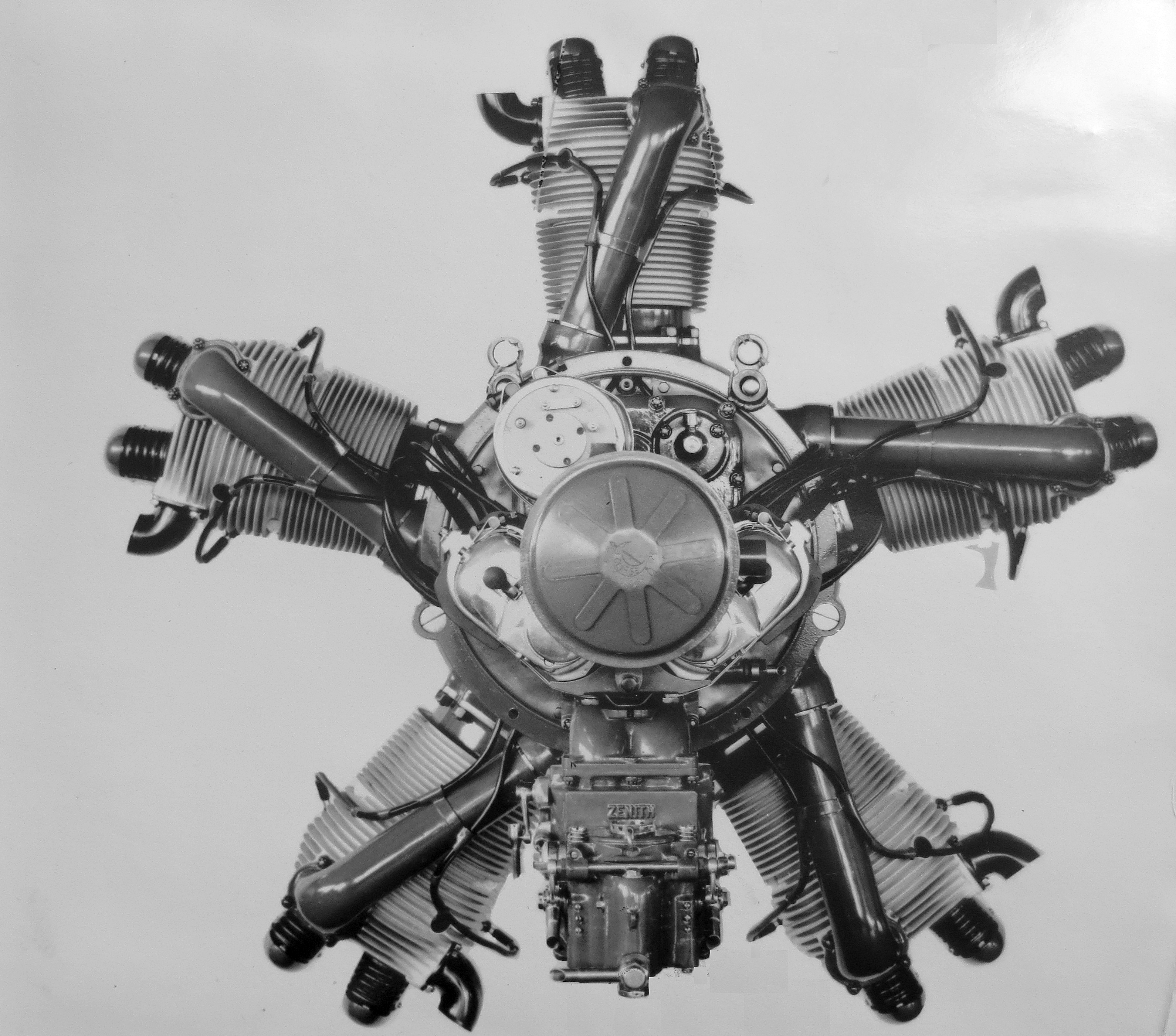 letecký pětiválcový hvězdicový motor